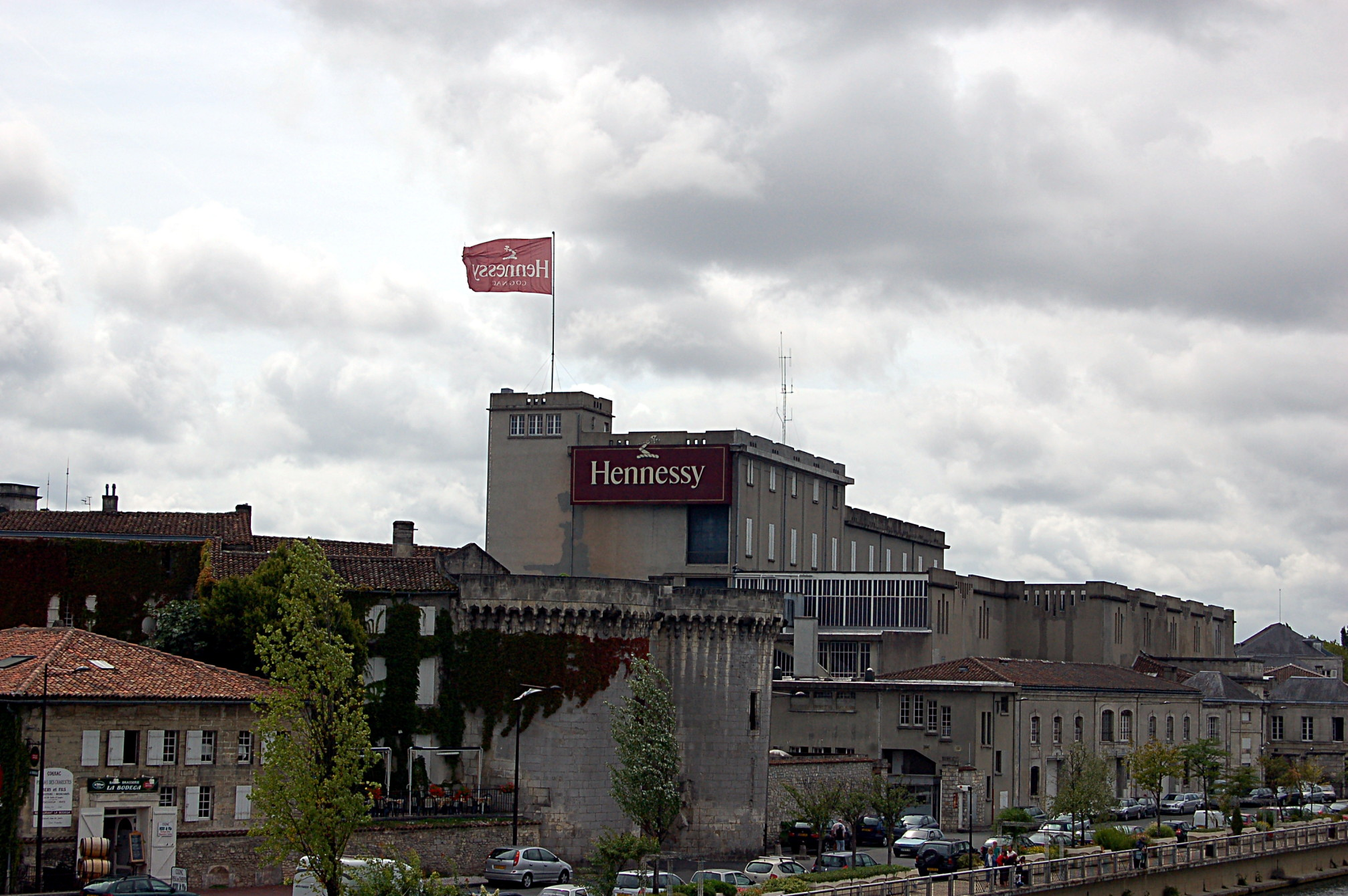 Schnapsbrennerei Hennessy in Cognac, Frankreich